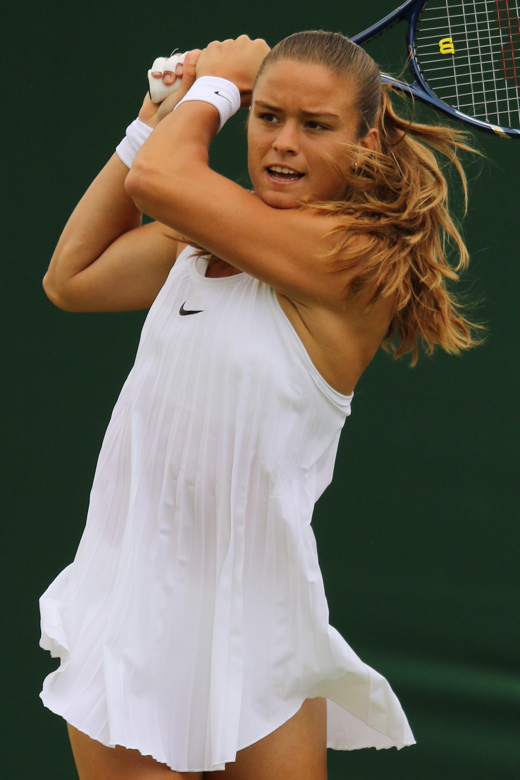 Sakkari WM16 (9)